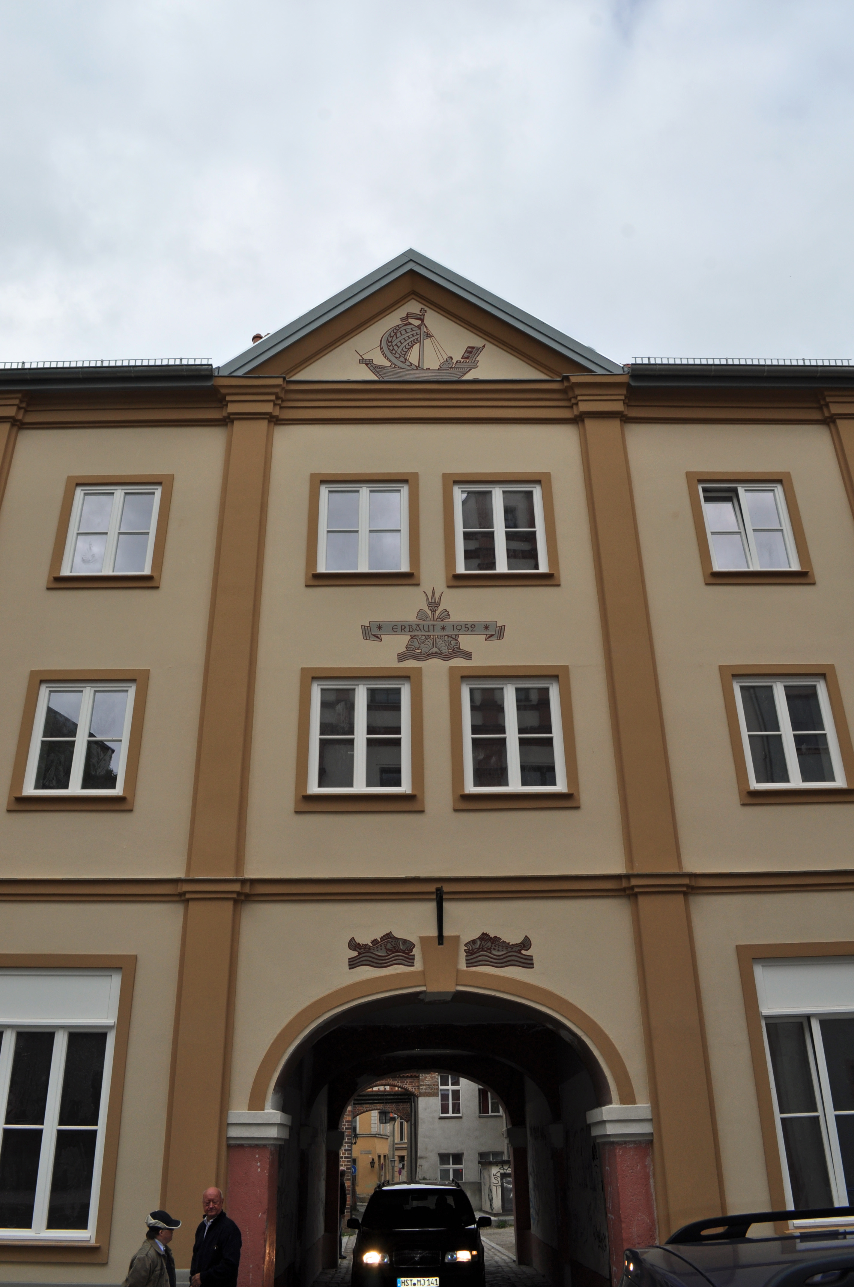 Stralsund, Semlower Straße 41 (2012-09-15) 2, by Klugschnacker in Wikipedia